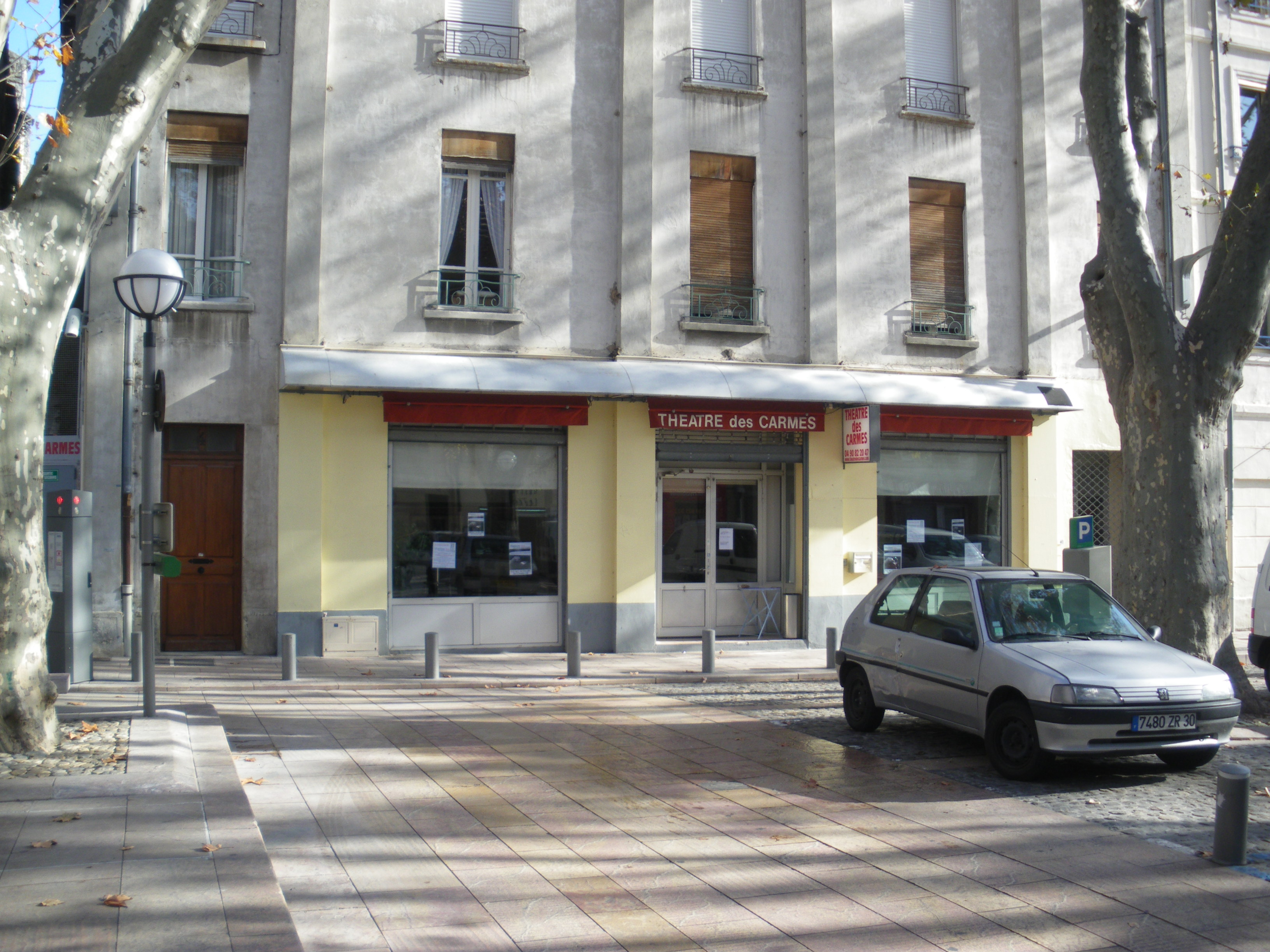 Théatre des Carmes, Avignon